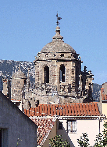 Ancienne abbaye bénédictine au Xe siècle devenue chapitre-collégiale au XIVe siècle, date de la construction du gros œuvre de l'église